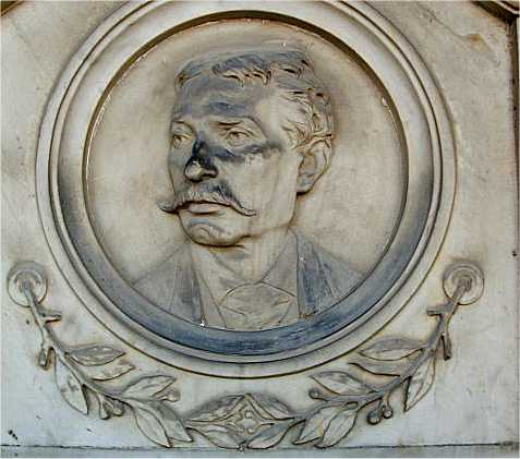 Ritratto in bassorilievo di Gaetano Mastellari sulla sua tomba nel cimitero di Parma arco n.31. Opera di maestranze locali.